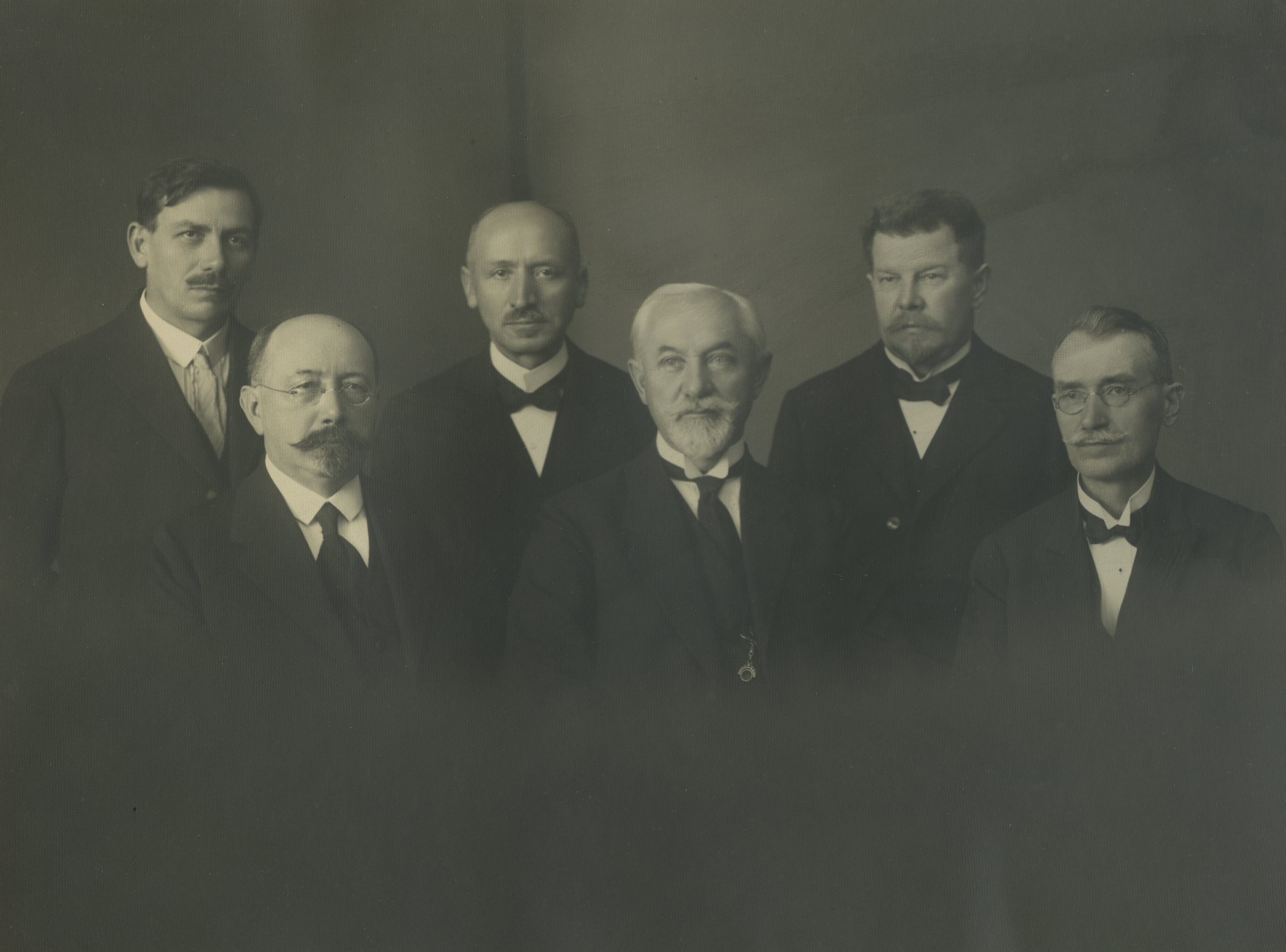 Synodní výbor (rada) po 1. synodu 1921 (21.-25.2.1921) po odchodu Ferdinanda Císaře, faráře v Kloboukách do důchodu. Sedící zleva: prof. dr. Ferdinand Hrejsa, náměstek seniora, Josef Souček, syndoní senior, Fedinand Kavka, synodní kurátor. Stojící zleva: doc. Antonín Boháč, laický člen synodního výboru, František Prudký, farář v Olomouci, JUDr. Josef Král, laik.